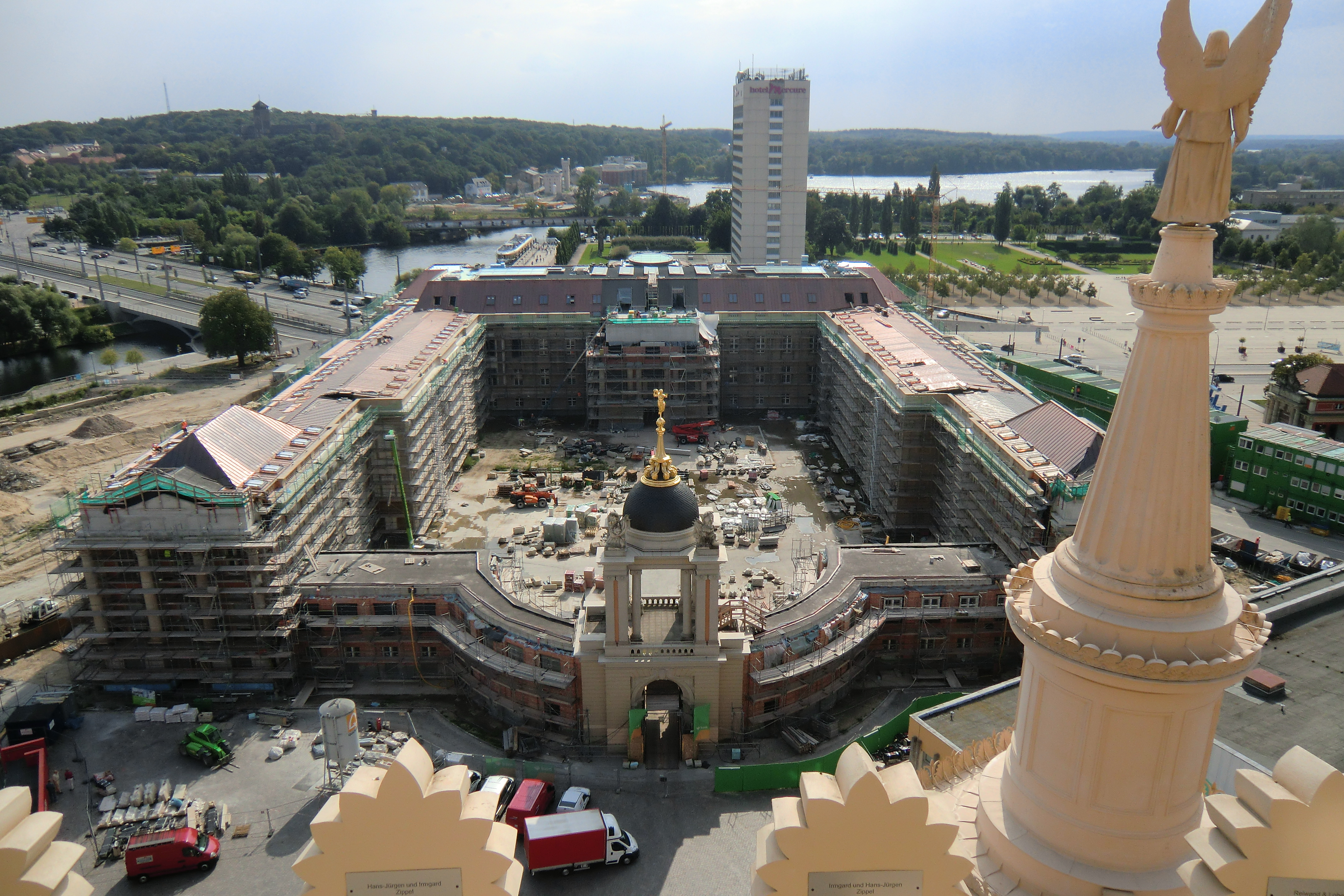 Baustelle des Landtages in Potsdam im September 2012 von der Nikolaikirche aus gesehen.